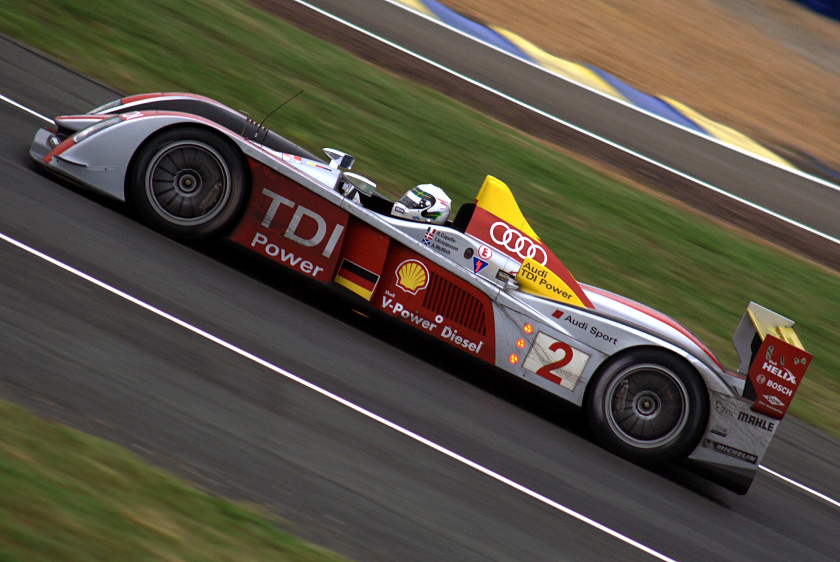 Allan McNish sur Audi R10, essais préliminaires, 24 heures du Mans 2008